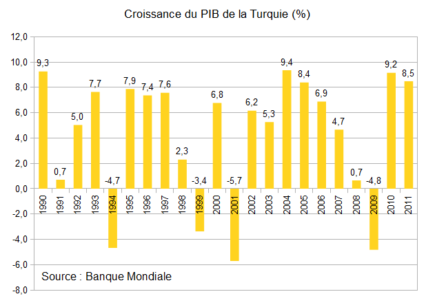 PIB de la Turquie - Source: Banque Mondiale